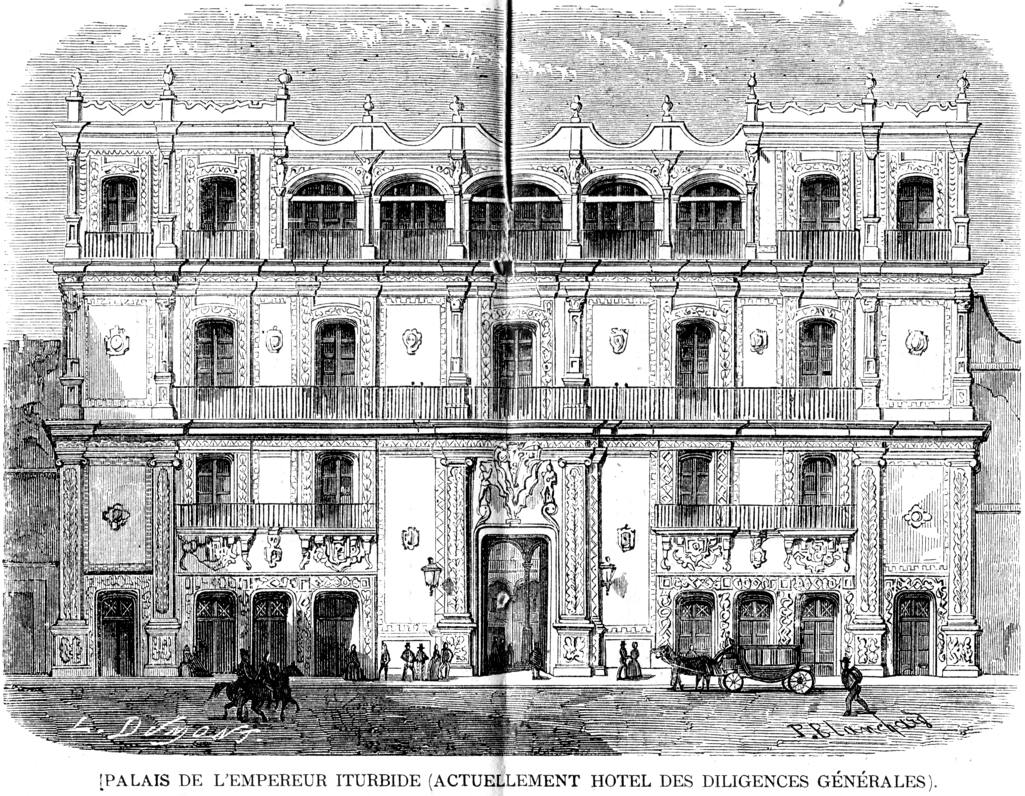 Ilustración de 1862 del Palacio del Emperador Iturbide, actualmente Hotel